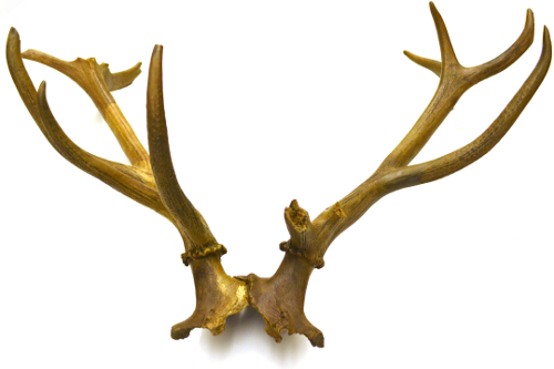 Front view of the RGZM copy of Bedburg-Königshoven antler frontlet 1